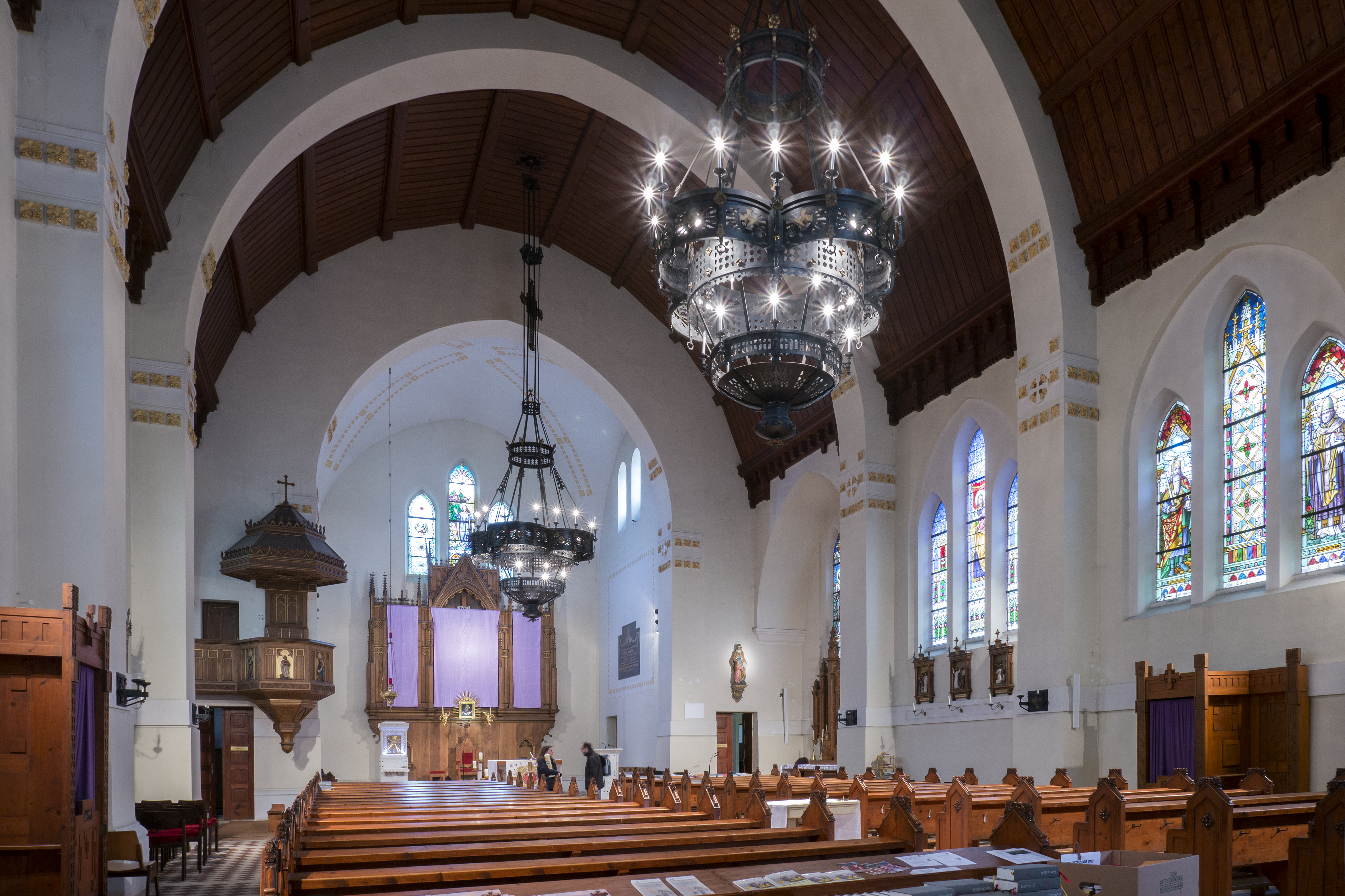 Kaiser-Franz-Josef-Jubiläumskirche Allerheiligste Dreifaltigkeit